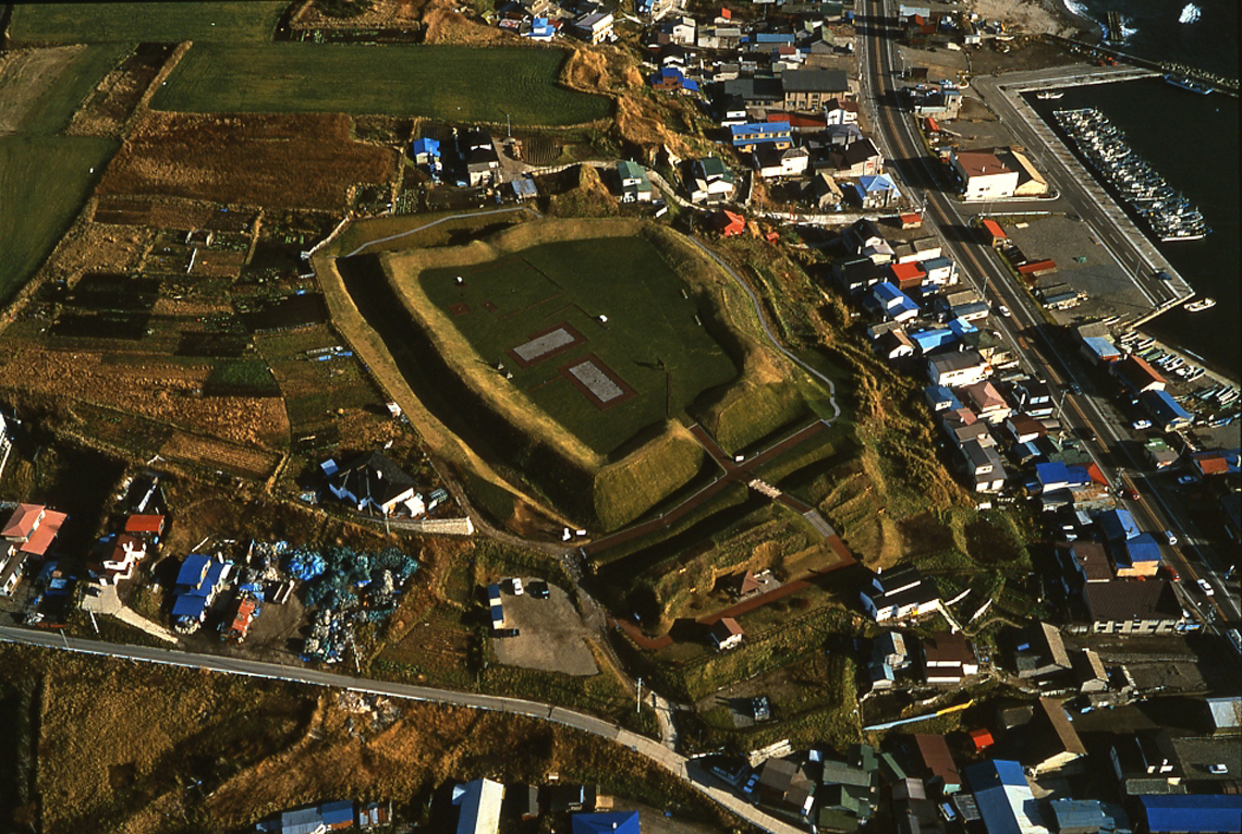 史跡志苔館跡の空撮写真